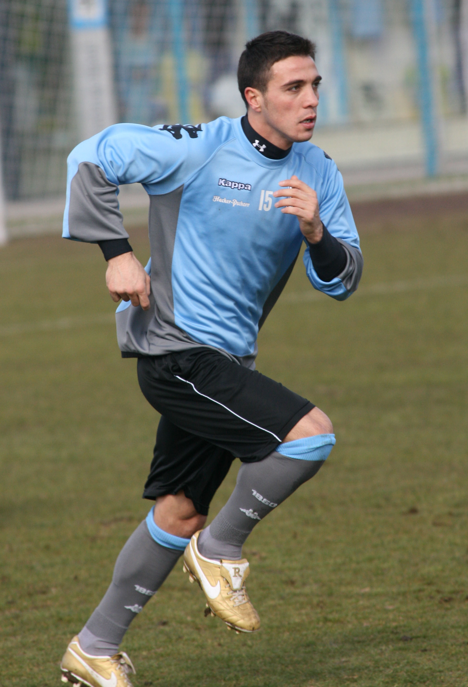 Berkant Göktan, player of TSV 1860 München, training, 11.03.2007, Grünwalder Str., Munich